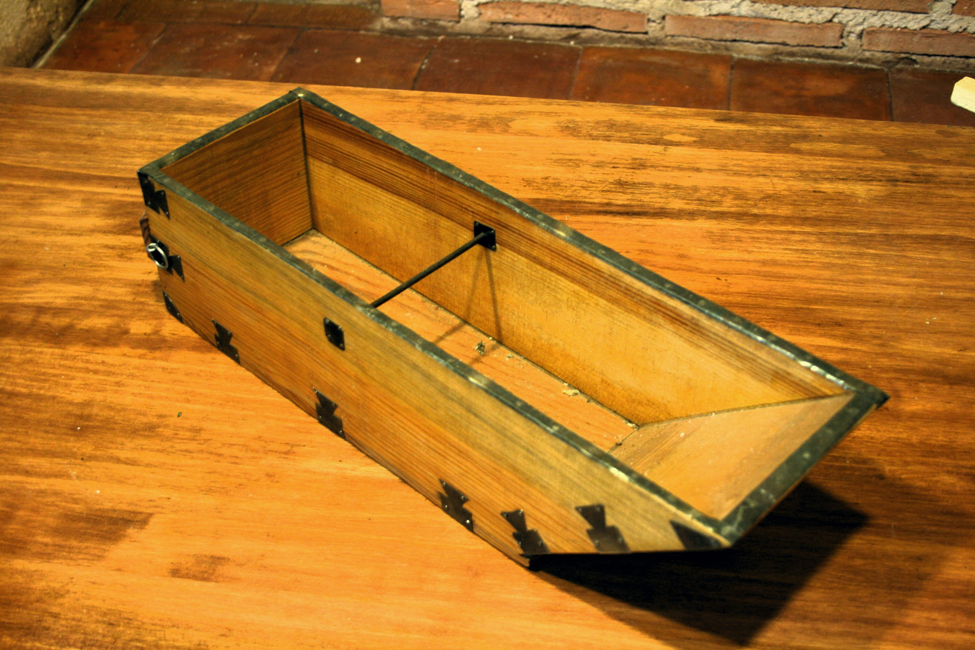 Cuartilla, 1/4 de fanega. Equivale a 3 celemines.